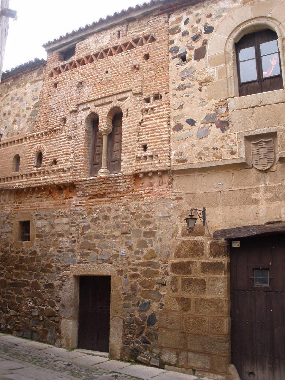 Casa Mudéjar (Cáceres)